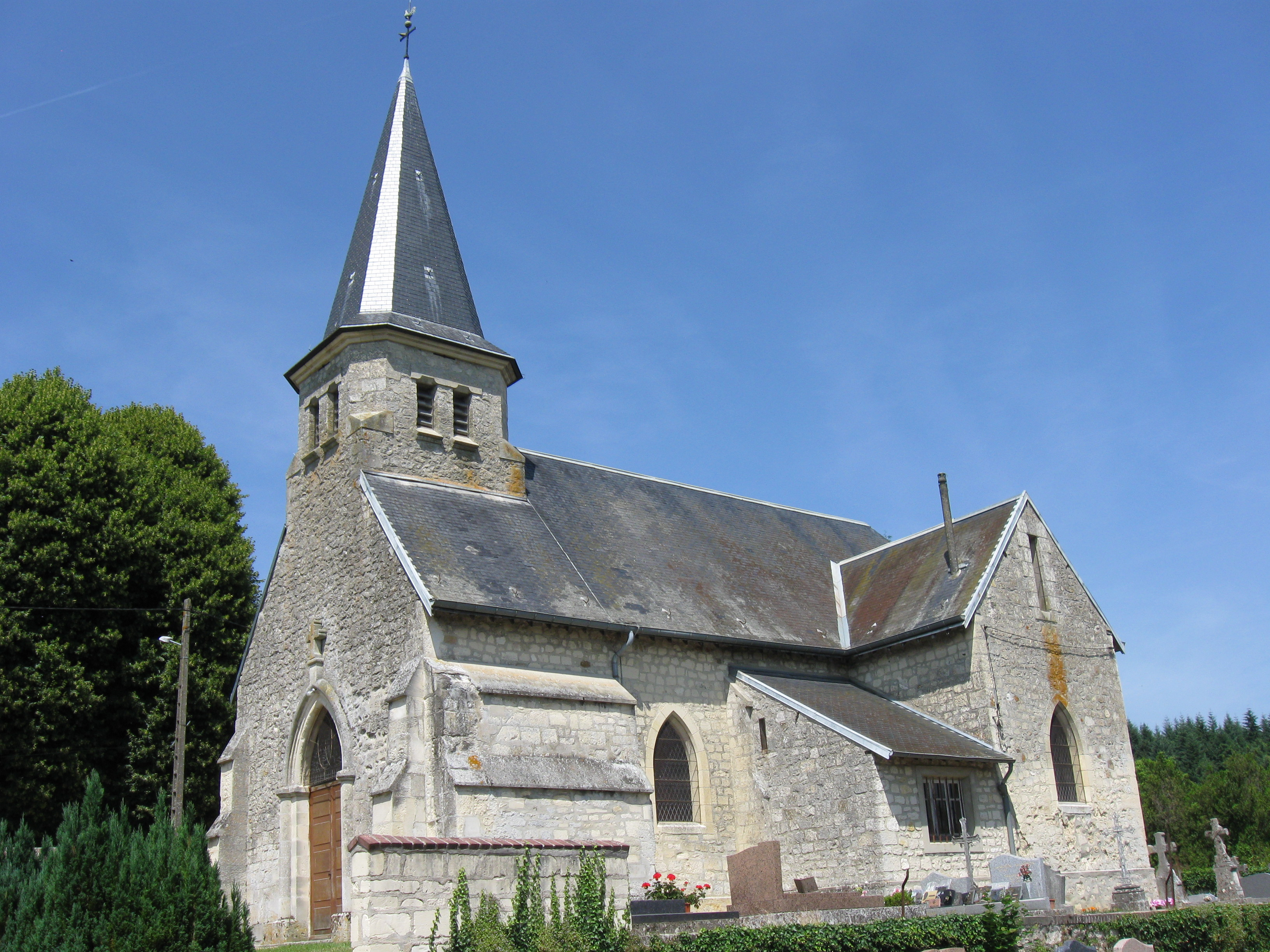 Église Saint-Médard de Silly-la-Poterie. (département de l'Aisne, région Picardie).